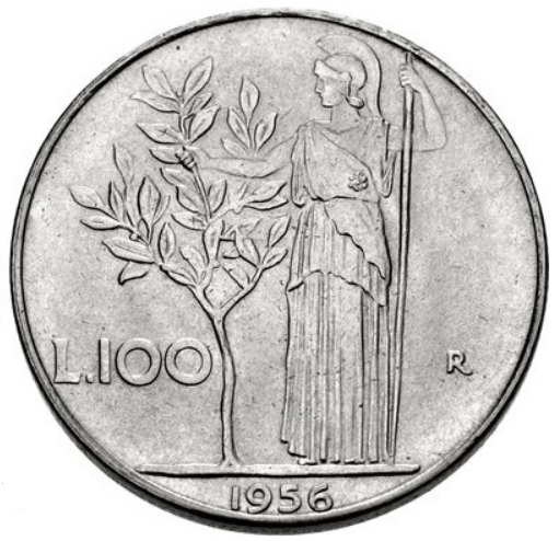 100 lire italiane 1956, Minerva 1° tipo